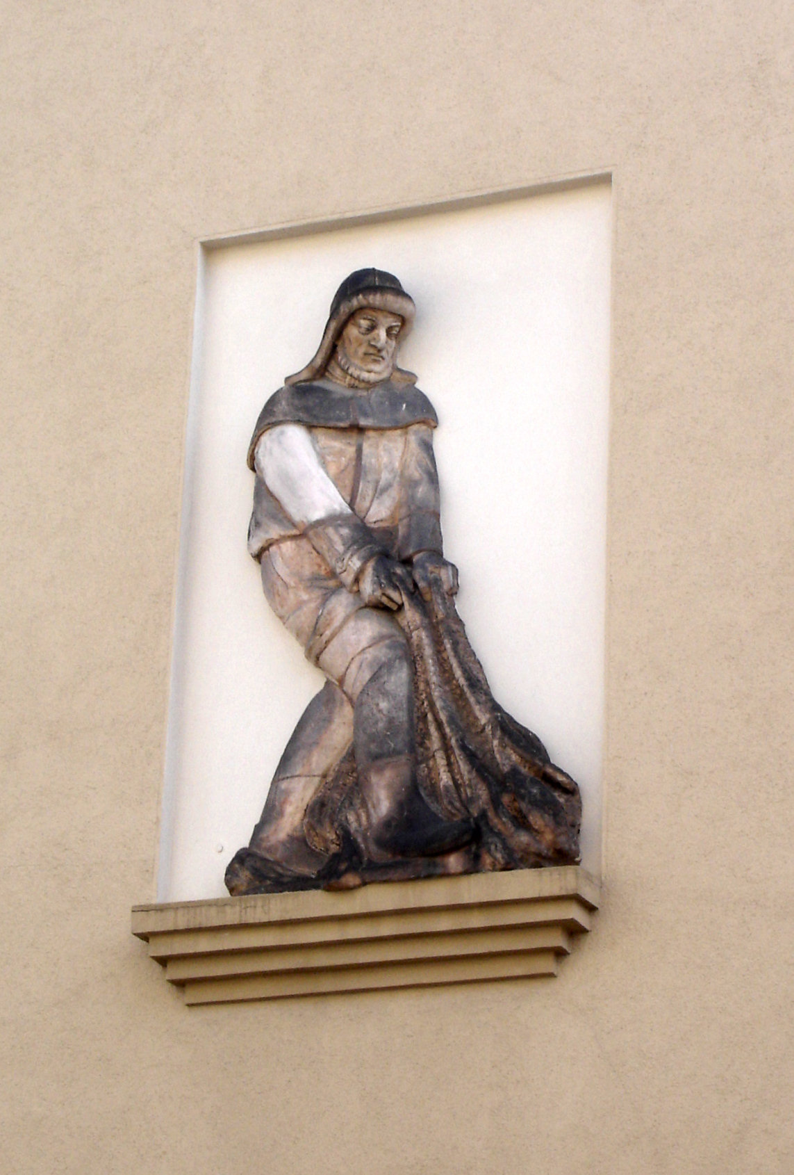 Wandfigur "Fischer" in Rostock / Sculpture "Fisherman" in Rostock